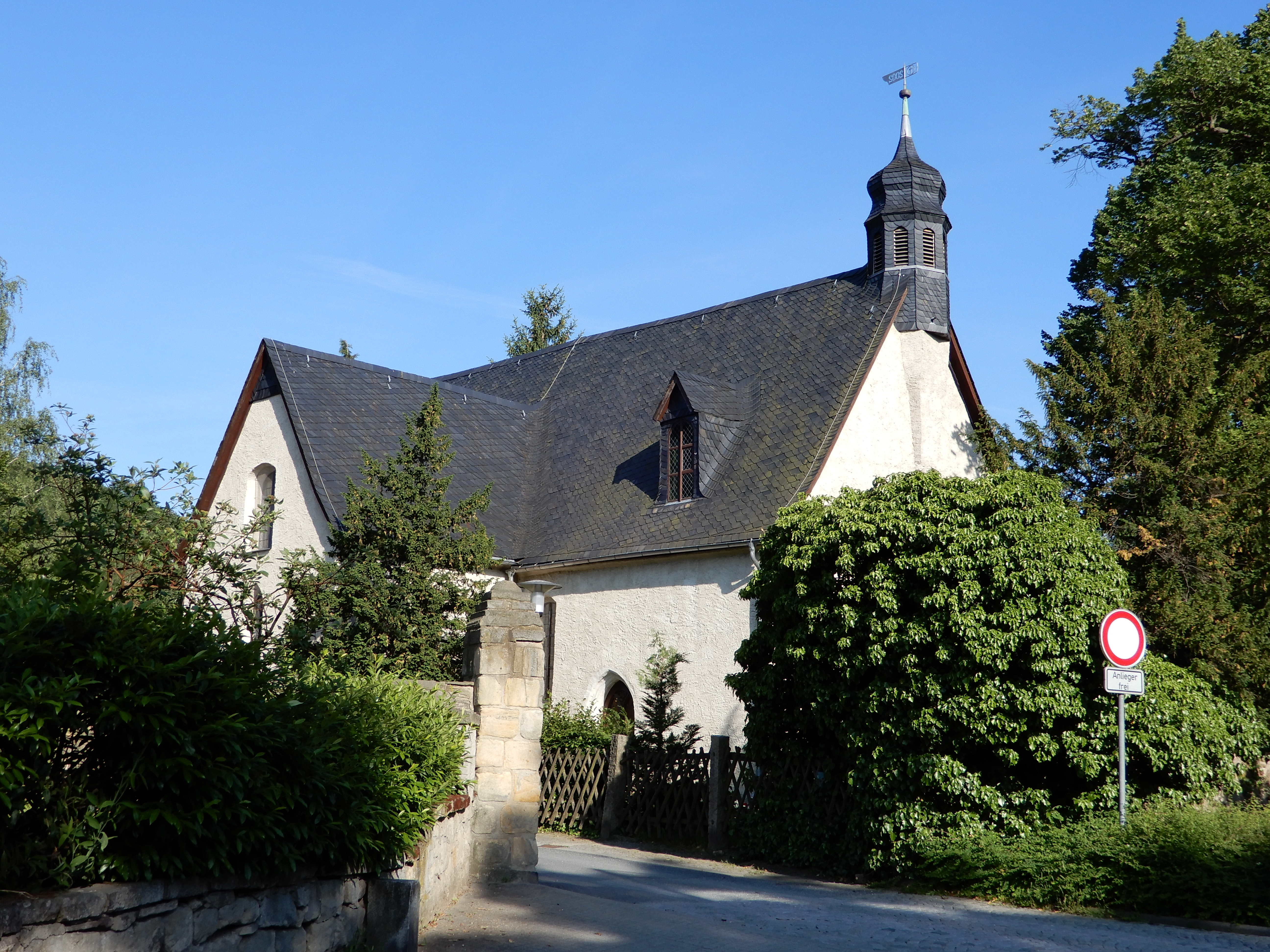 Theobaldikapelle auf dem Theobaldifriedhof in Nöschenrode